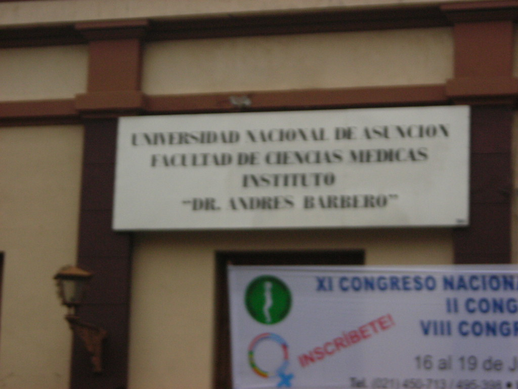 clinica